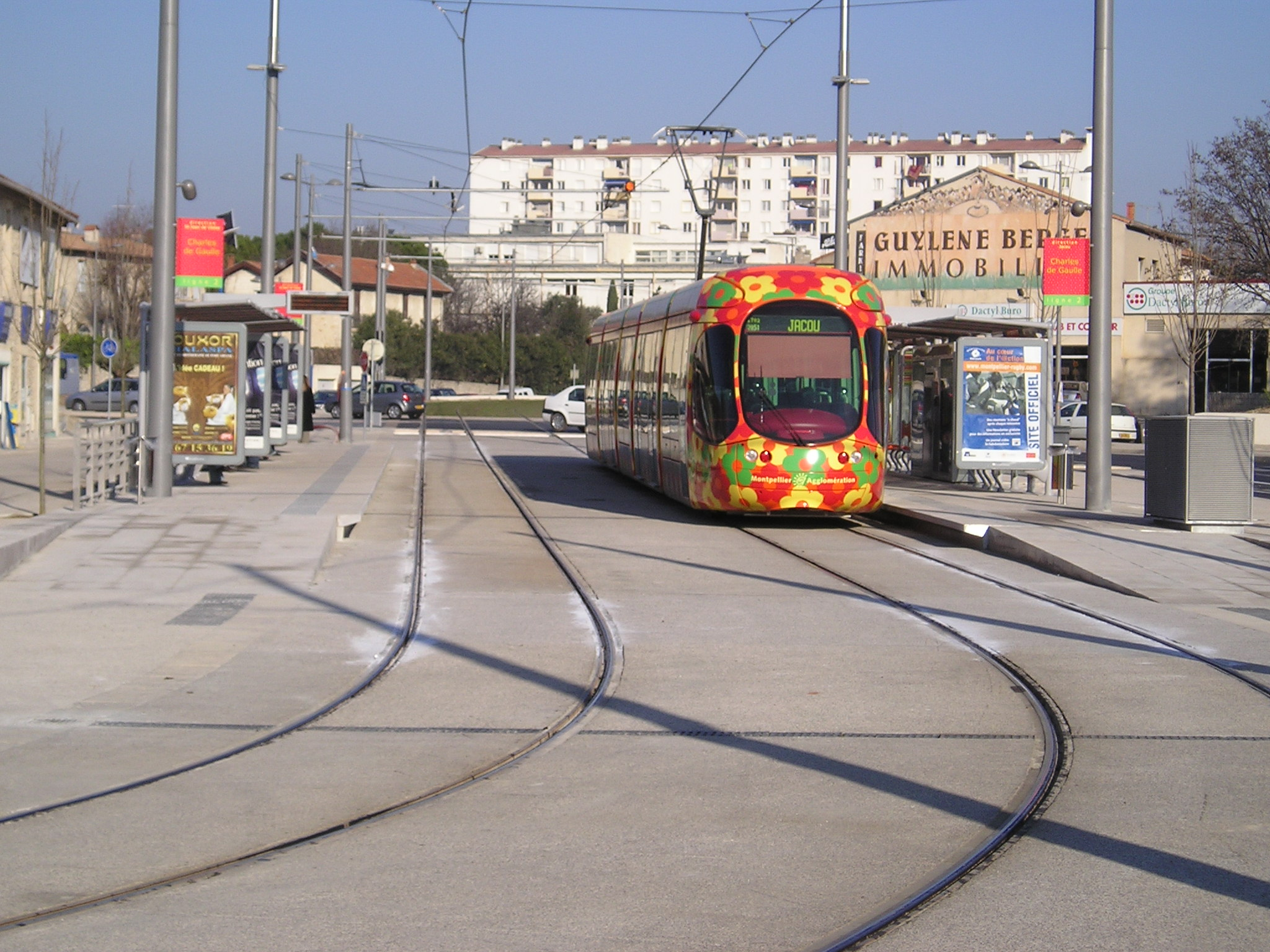 Rame de la ligne 2 en direction de Jacou à l'arrêt à la station Charles de Gaulle, à Castelnau-le-Lez